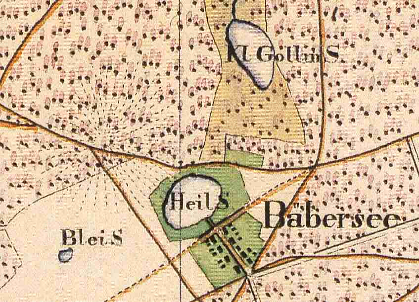 Bebersee, Gemeindeteil der Stadt Templin, Landkreis Uckermark, Brandenburg, Deutschland, Ausschnitt aus dem Urmesstischblatt 2847 Vietmannsdorf von 1826